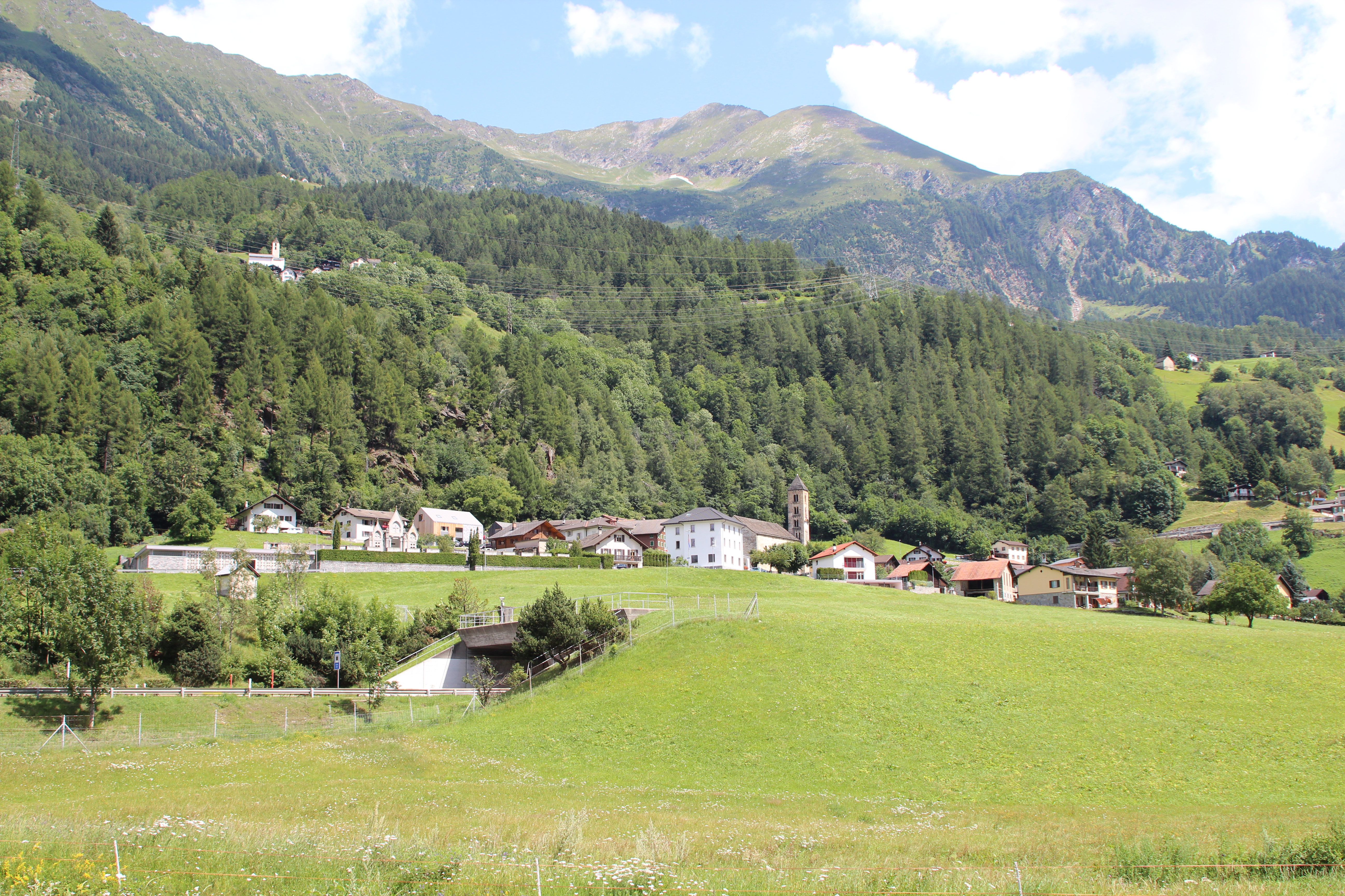 Quinto TI